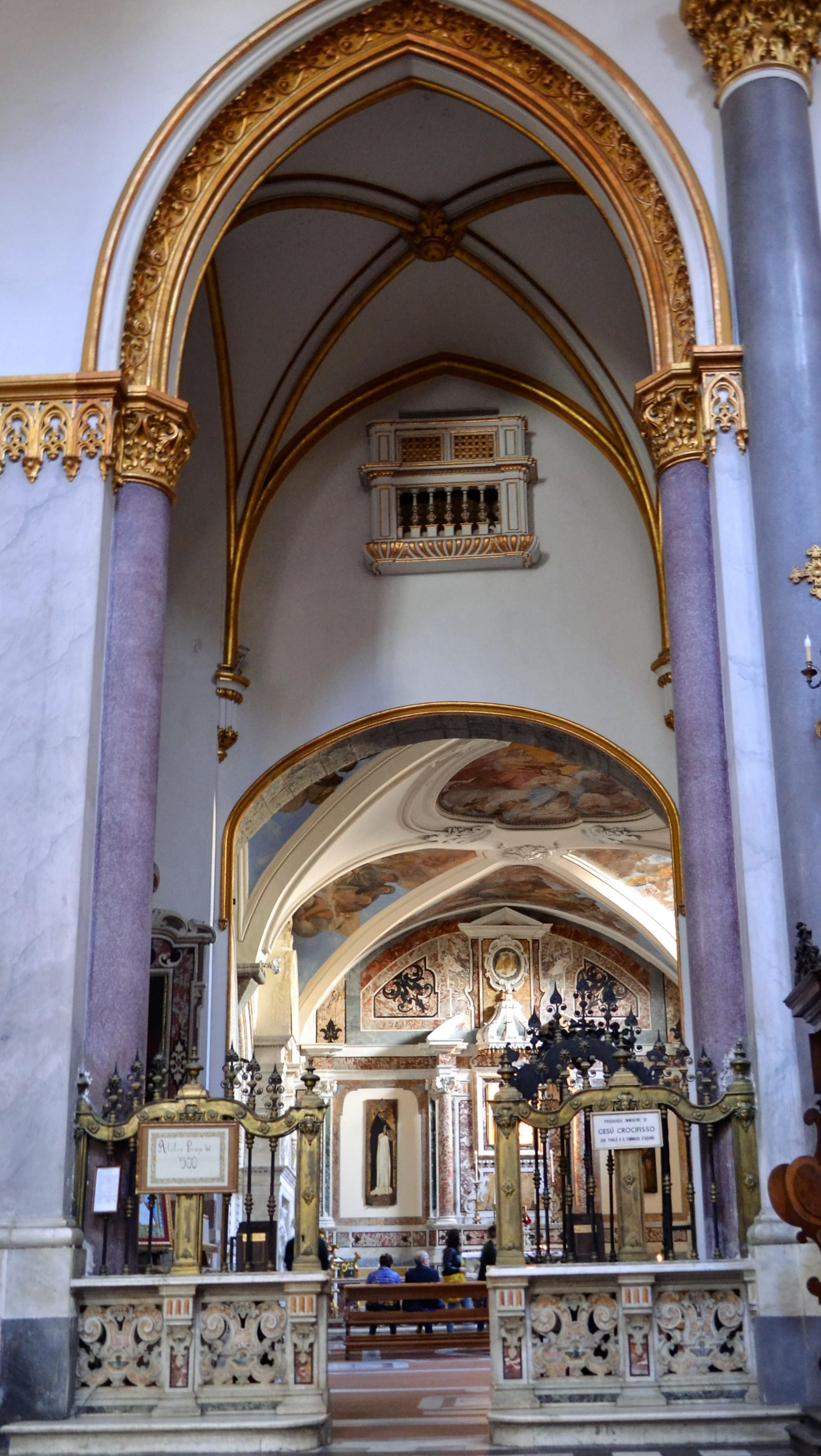 Il Cappellone del Crocefisso visto dalla navata della chiesa di San Domenico Maggiore di Napoli.